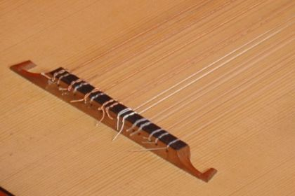 Reneszánsz lant húrláb